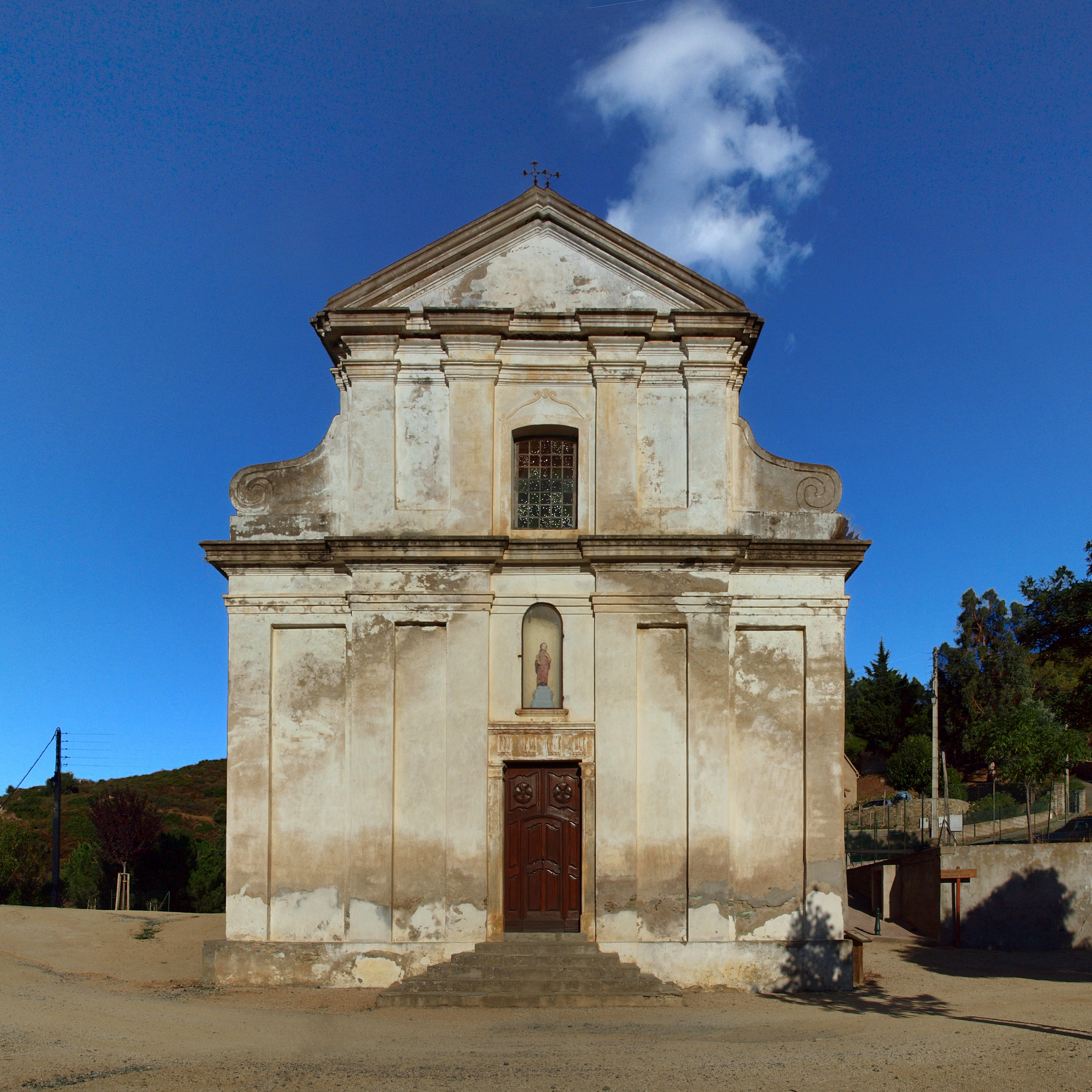 Piève, Nebbio (Corse) - Église paroissiale San Quilico. Son clocher est séparé.